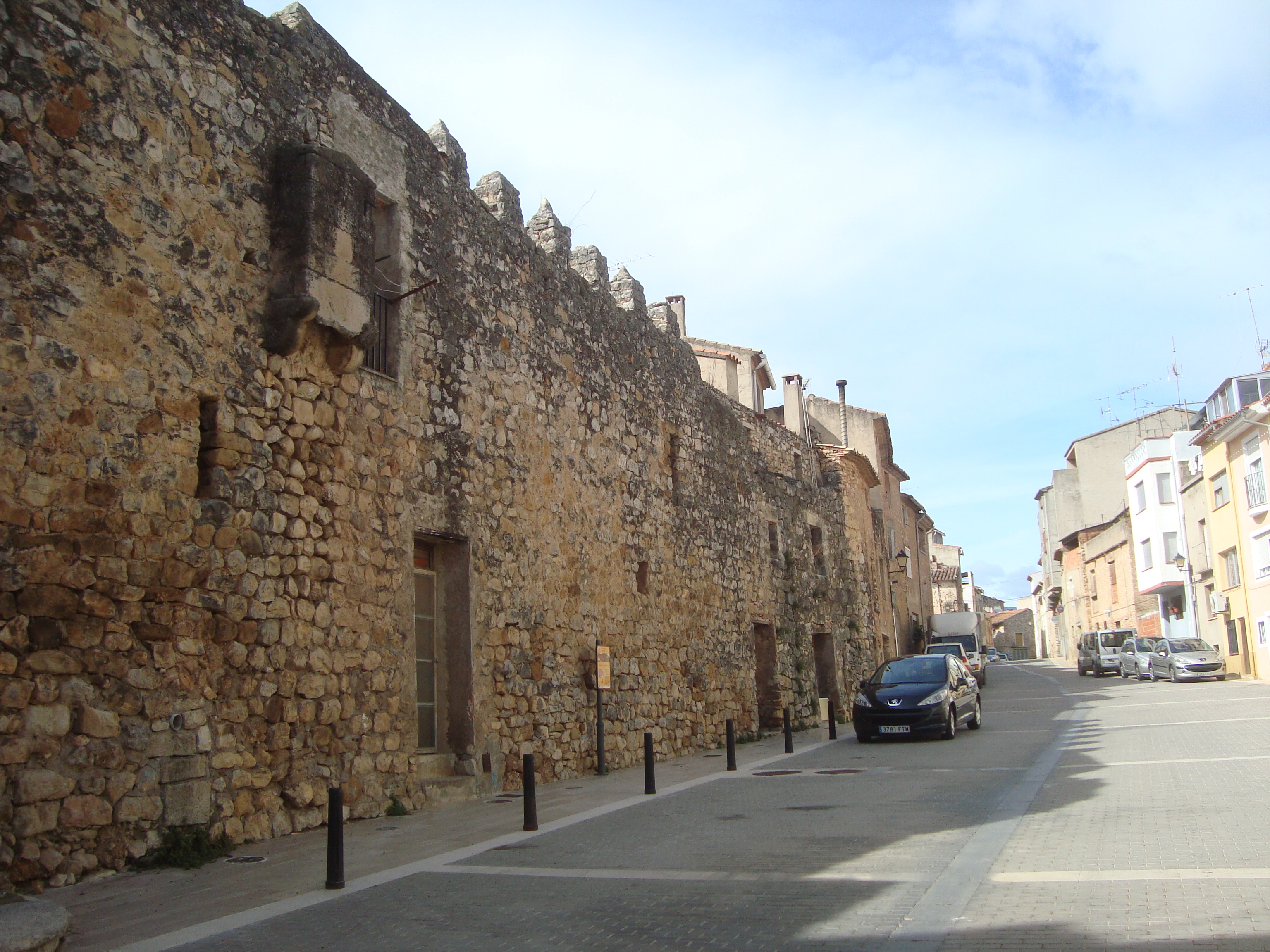 Recinte murat d'Atzeneta del Maestrat 04.001-008.